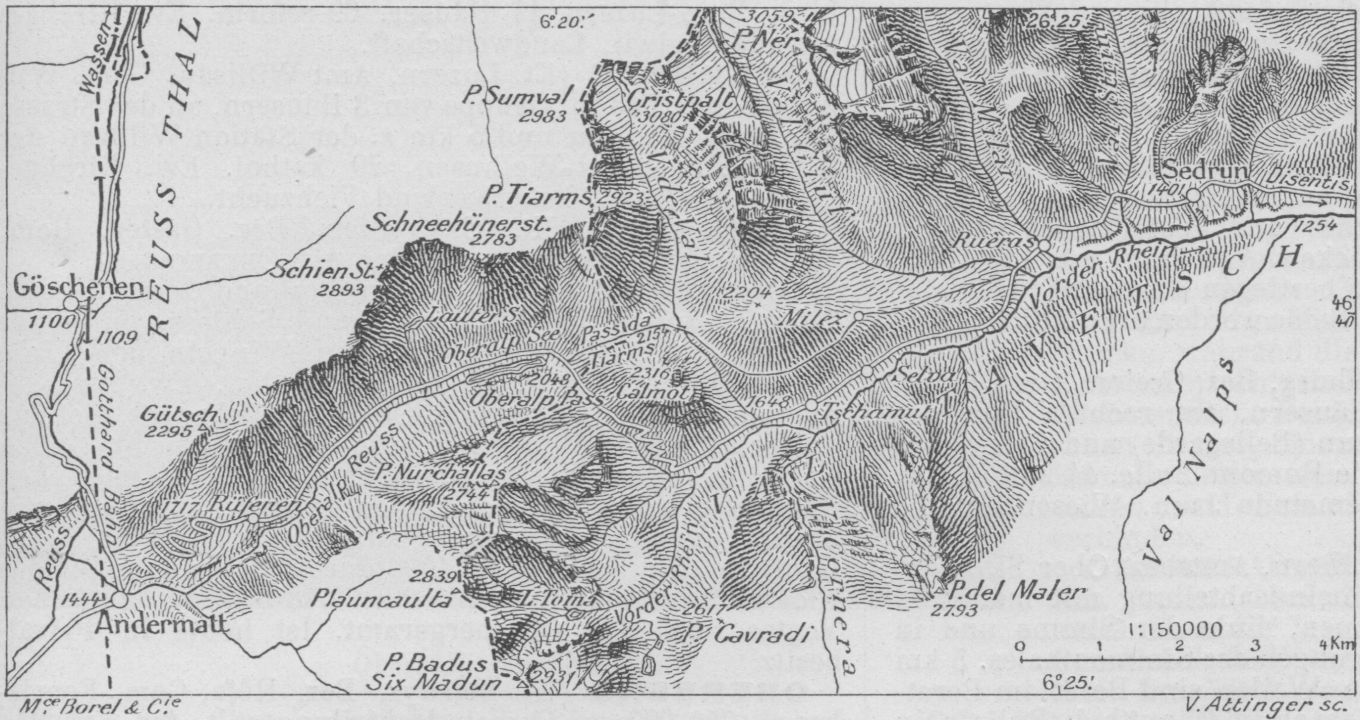 Quellgebiet des Vorderrheins: Val Maighels, Graubünden